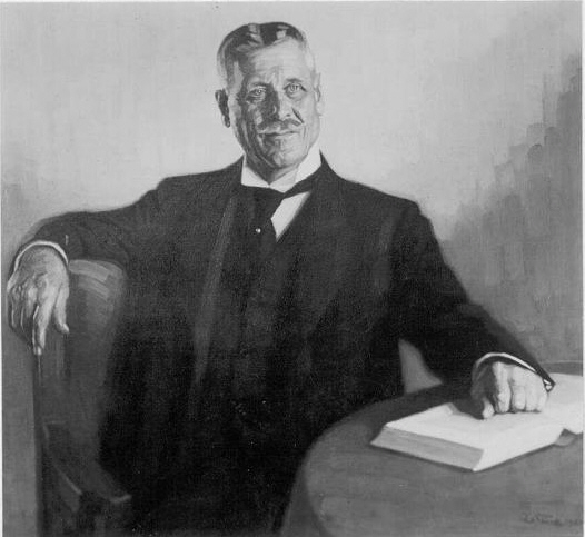 Edmund ter Meer (* 31. Juli 1852 in Krefeld; † 5. November 1931 in Uerdingen), Foto eines Gemäldes